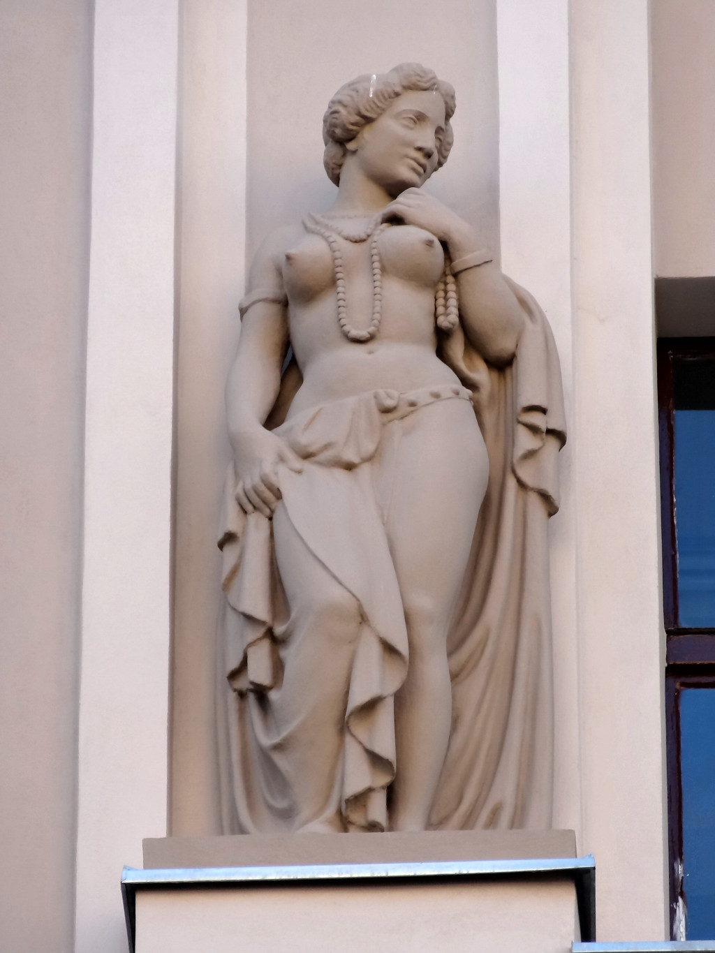 Dom Towarowy Jedynak, ul. Gdańska 15 w Bydgoszczy (zbud. 1910)